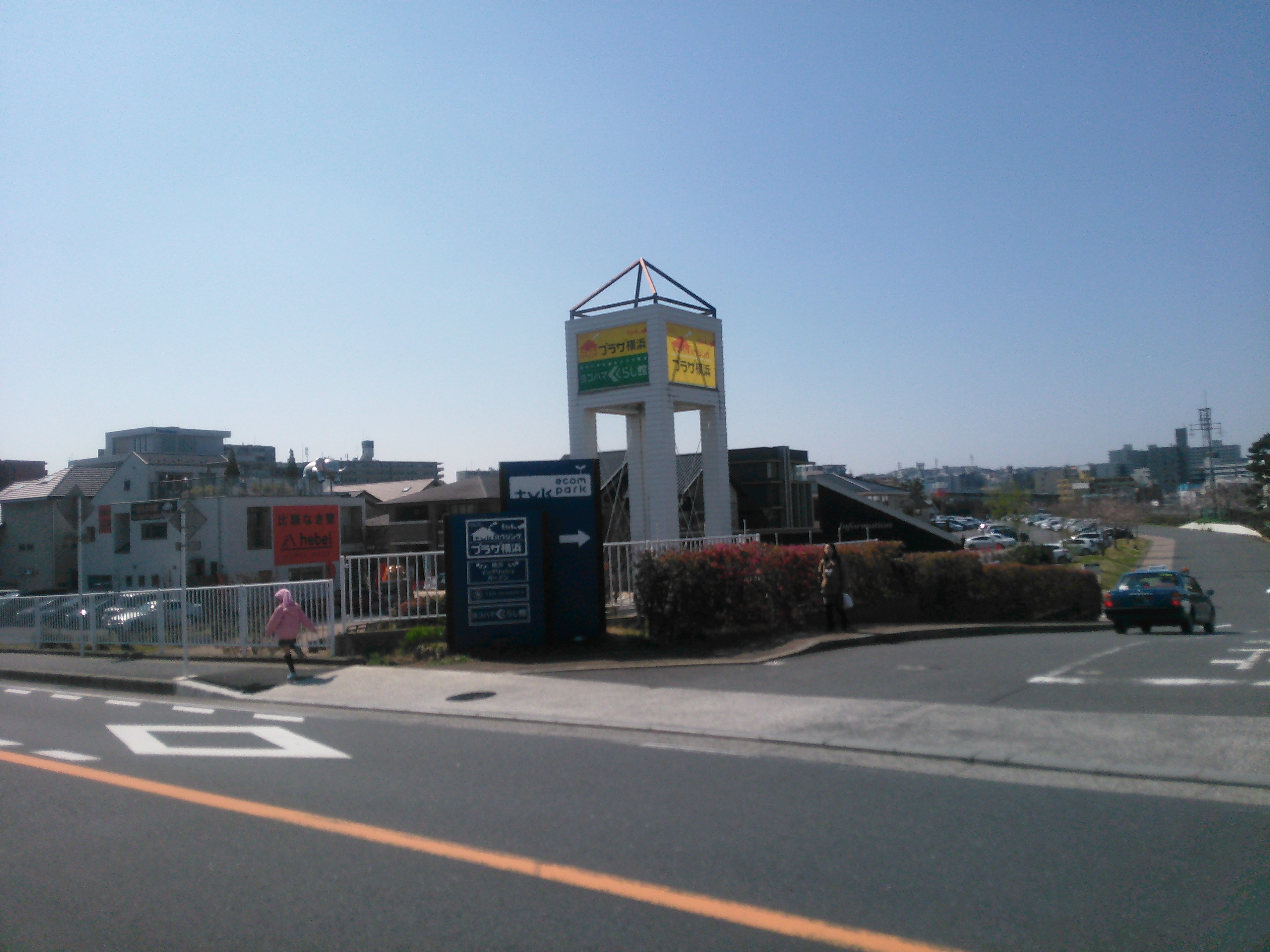 横浜市西区西平沼町、tvkハウジング プラザ横浜